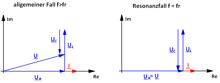 Zeigerdiagramm Resonazfall